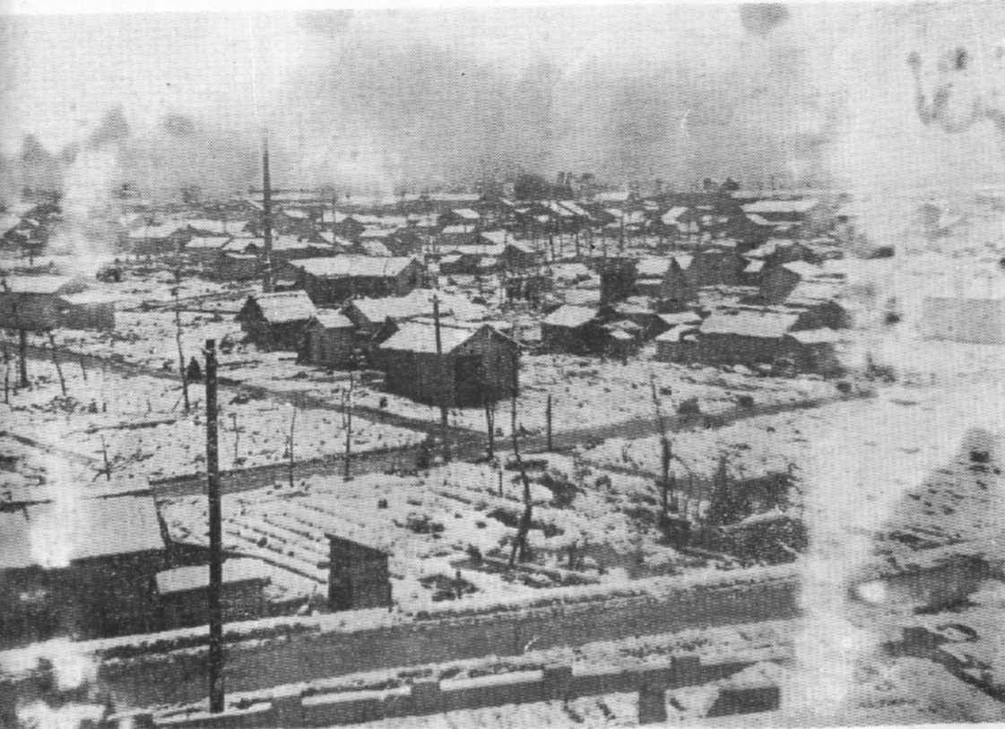 1946年（昭和21年）2月の富山市内